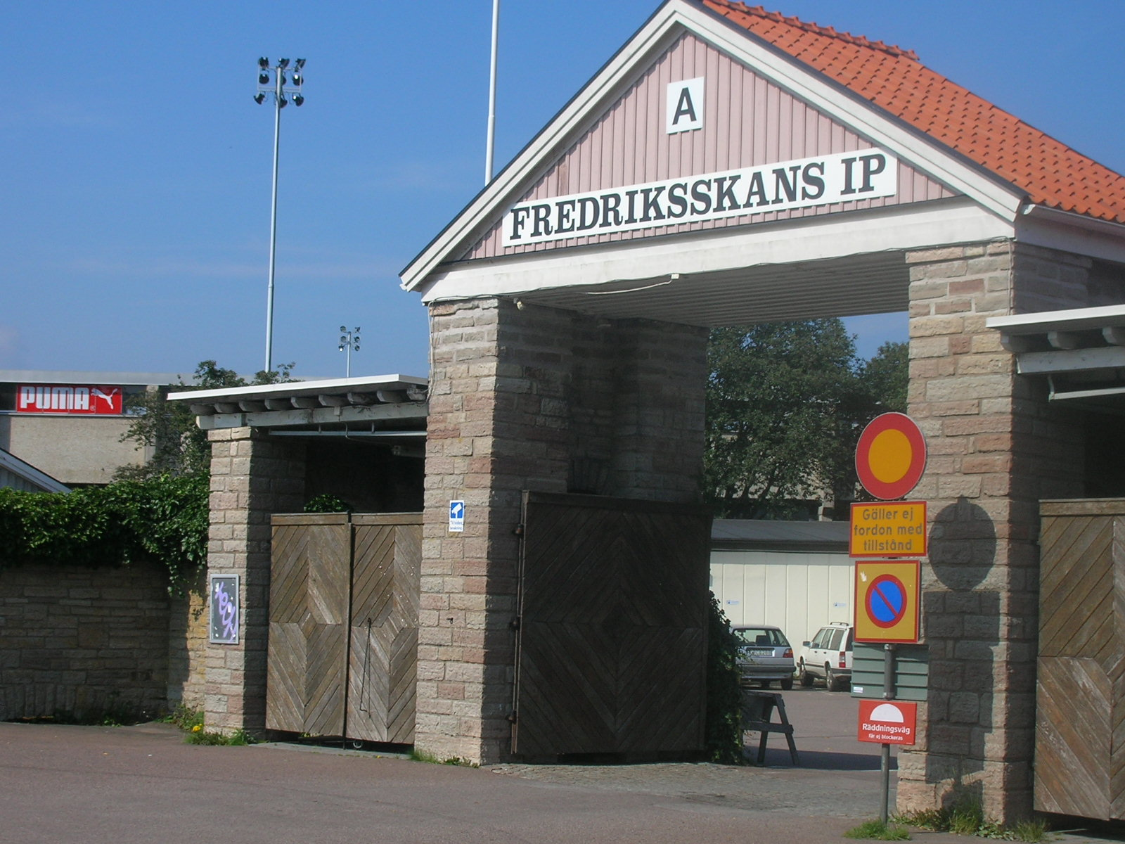 Fredriksskans IP Entré